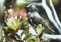 Kaua‘i ‘Ō‘ō (Moho braccatus)